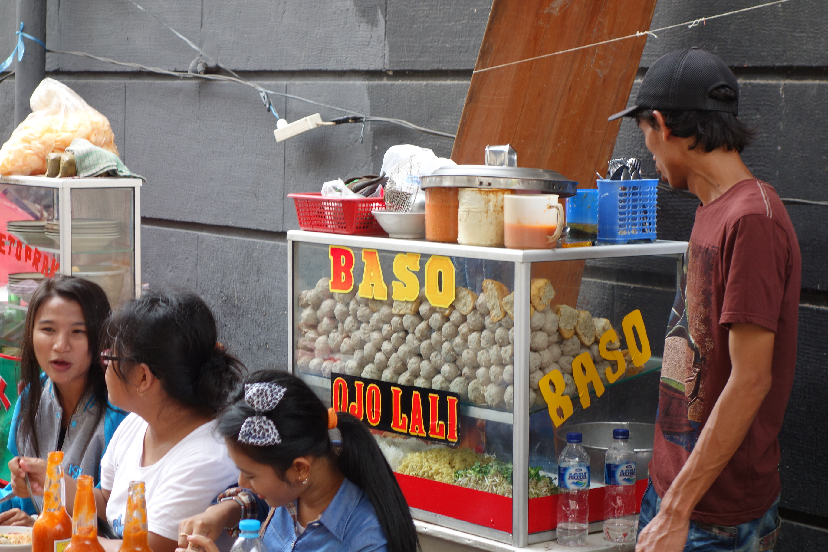 Baso vendor at Batavia square in Jakarta, Indonesia